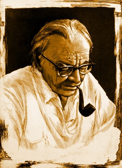 Portrait Carl Orff Radierung und geschabte Aquatinta